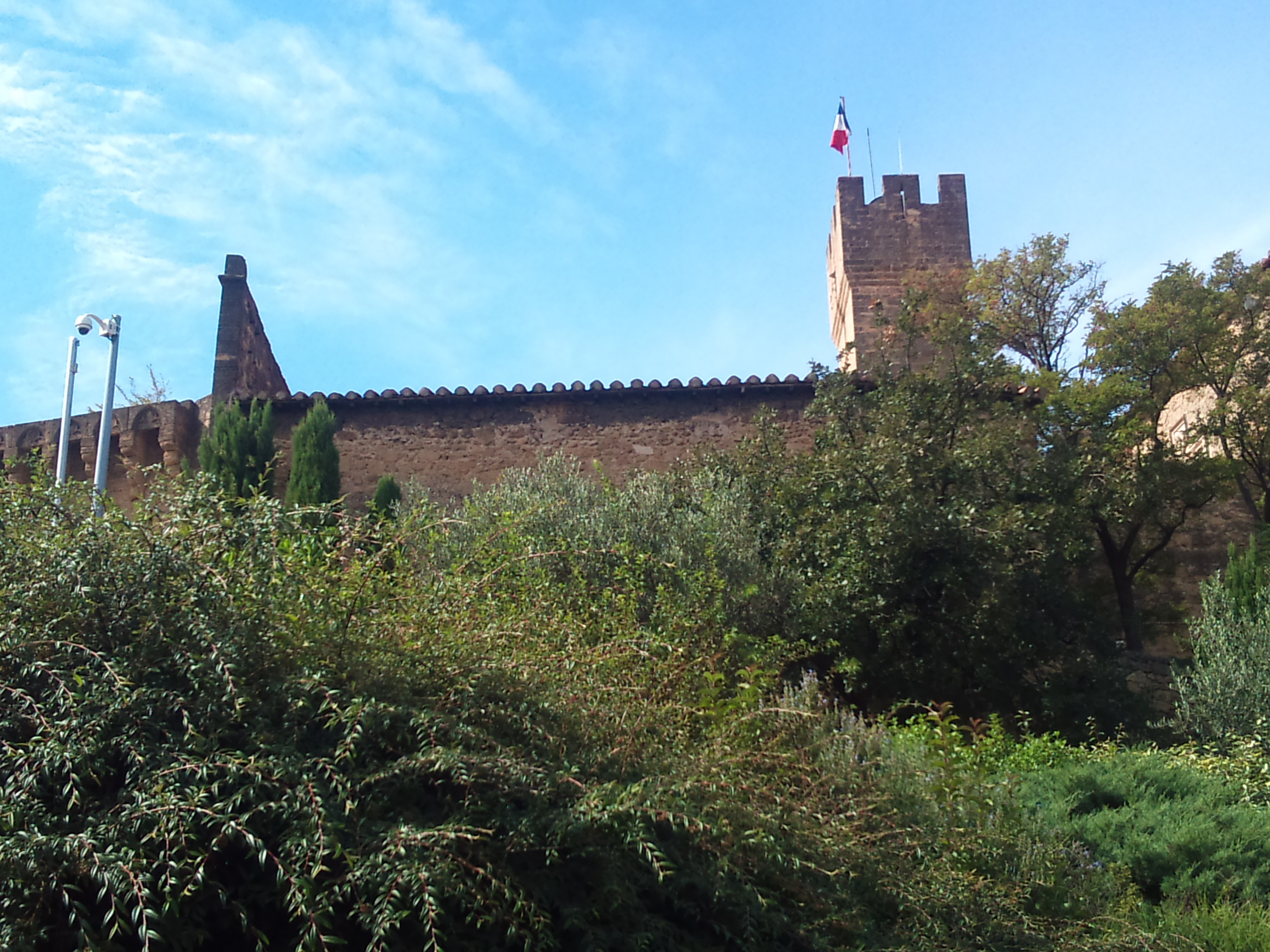 Photo prise en 2012